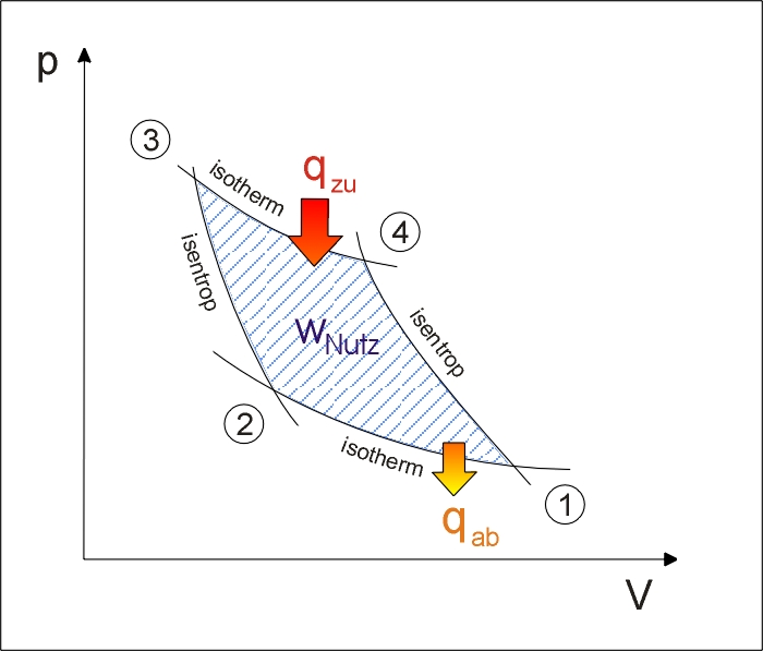 Der Carnot-Prozess im p-V-Diagramm als Wärmekraftmaschine